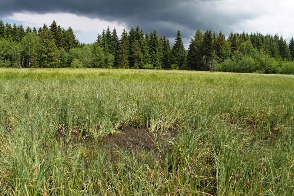 Velikonoční rybník v červnu.